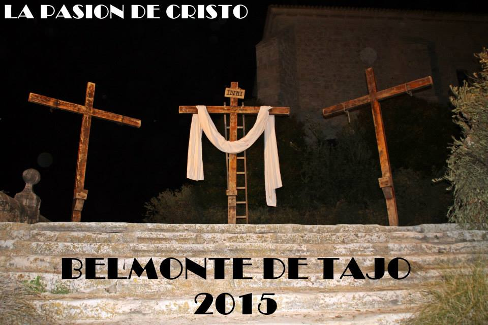 Pasion